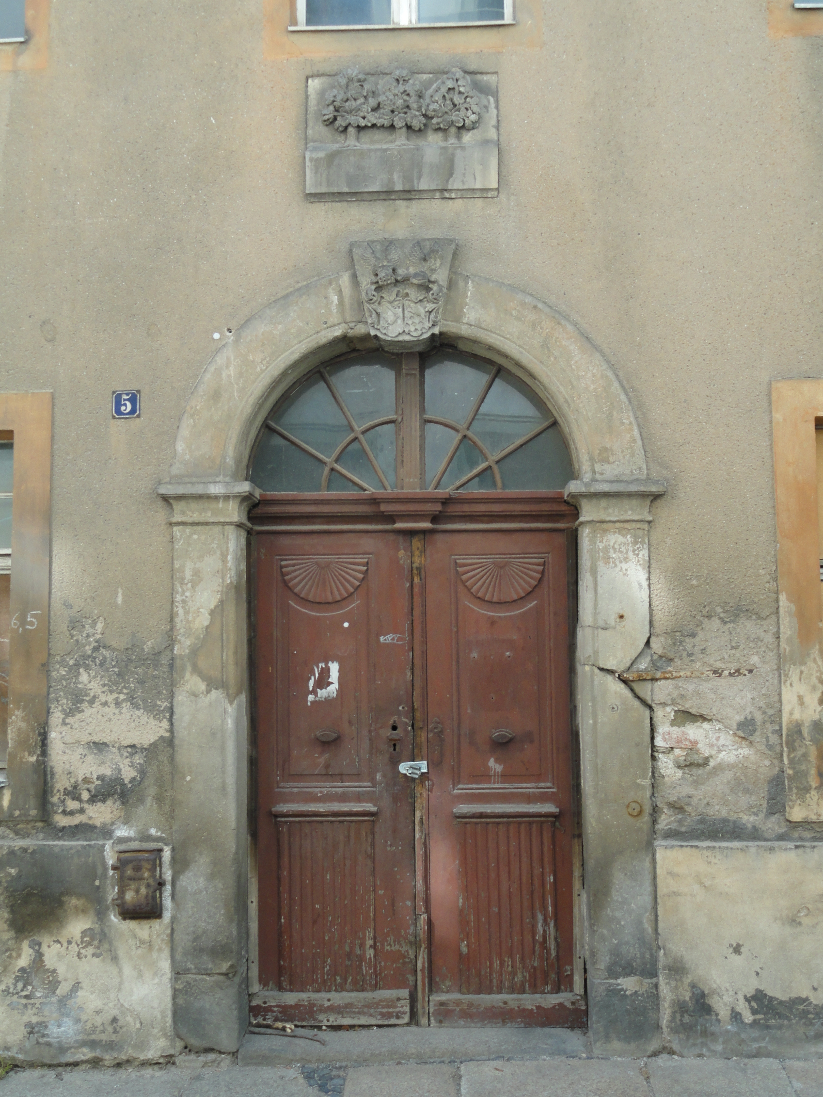 Portal des Eckhauses Drei Eichen an der Fischmarktstraße Ecke Klosterplatz Es zeigt drei Eichen und darunter die Inschrift „Unter den Eichen, abgebrannt am 30. Juli 1817, erbaut im Jahre 1818 von J. G. L. Weider“. Der Schlussstein im Bogen ist mit zwei Wappen verziert. Eines ist das Beyersche Wappen.